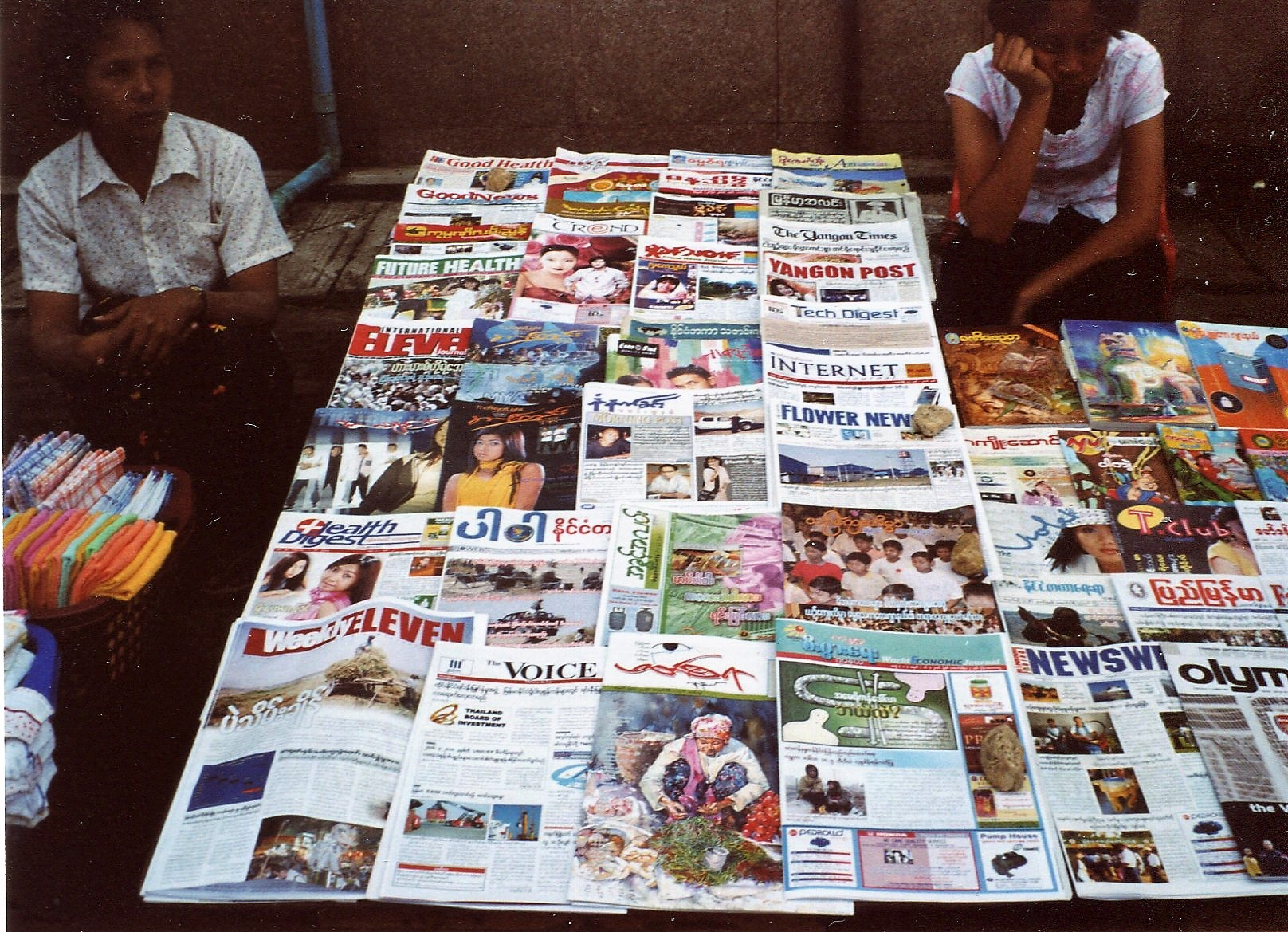 Un marchand de journaux à Yangon présentant des revues en Anglais et Birman